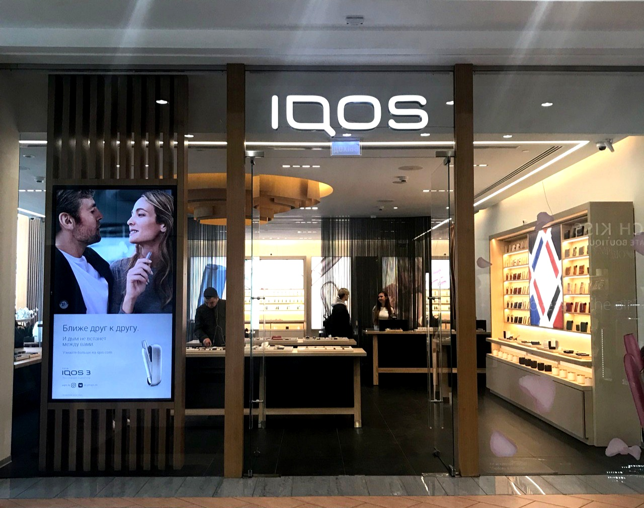 Магазин IQOS в Москве, ТЦ Атриум